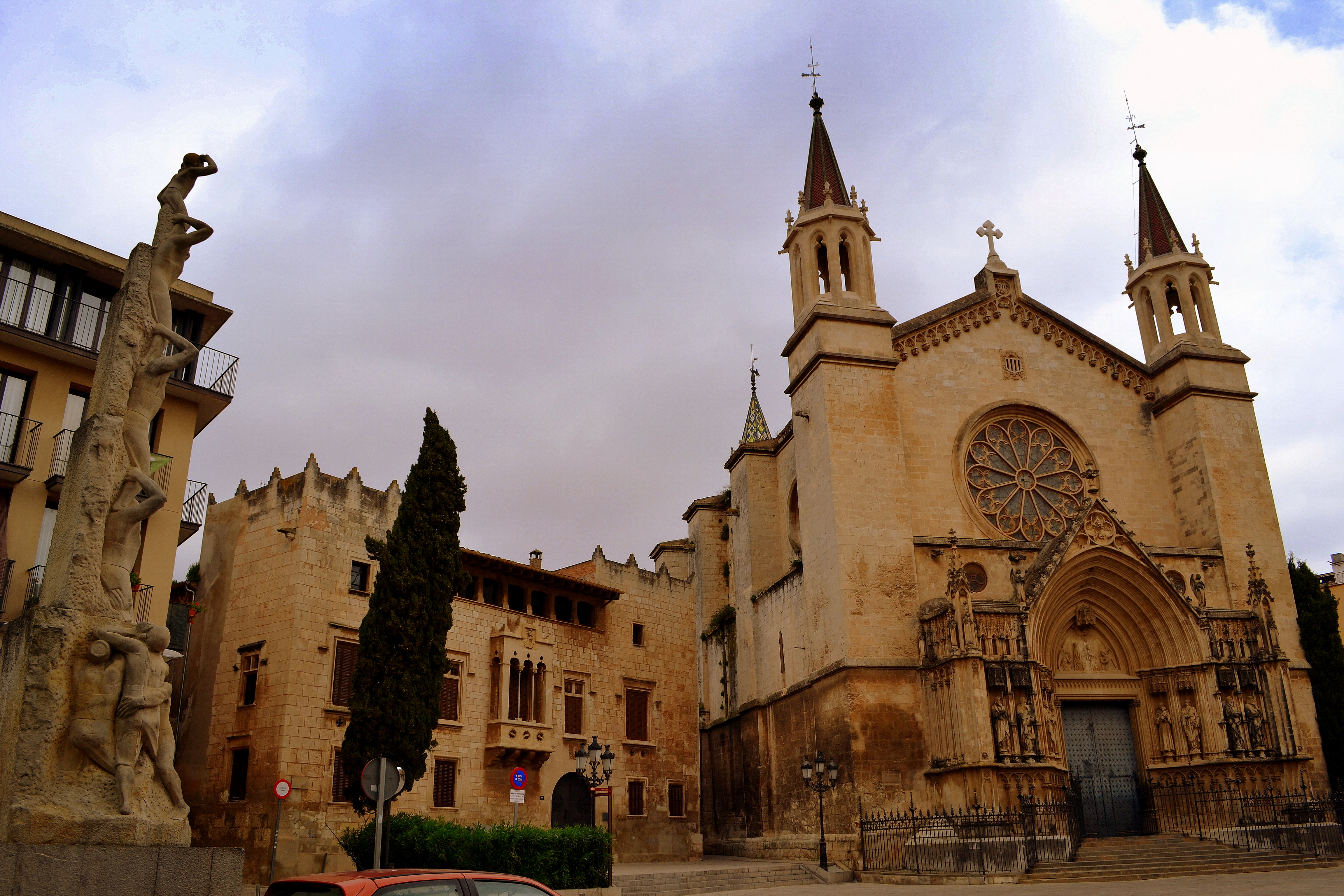 Plaça de Jaume I (Vilafranca del Penedès)